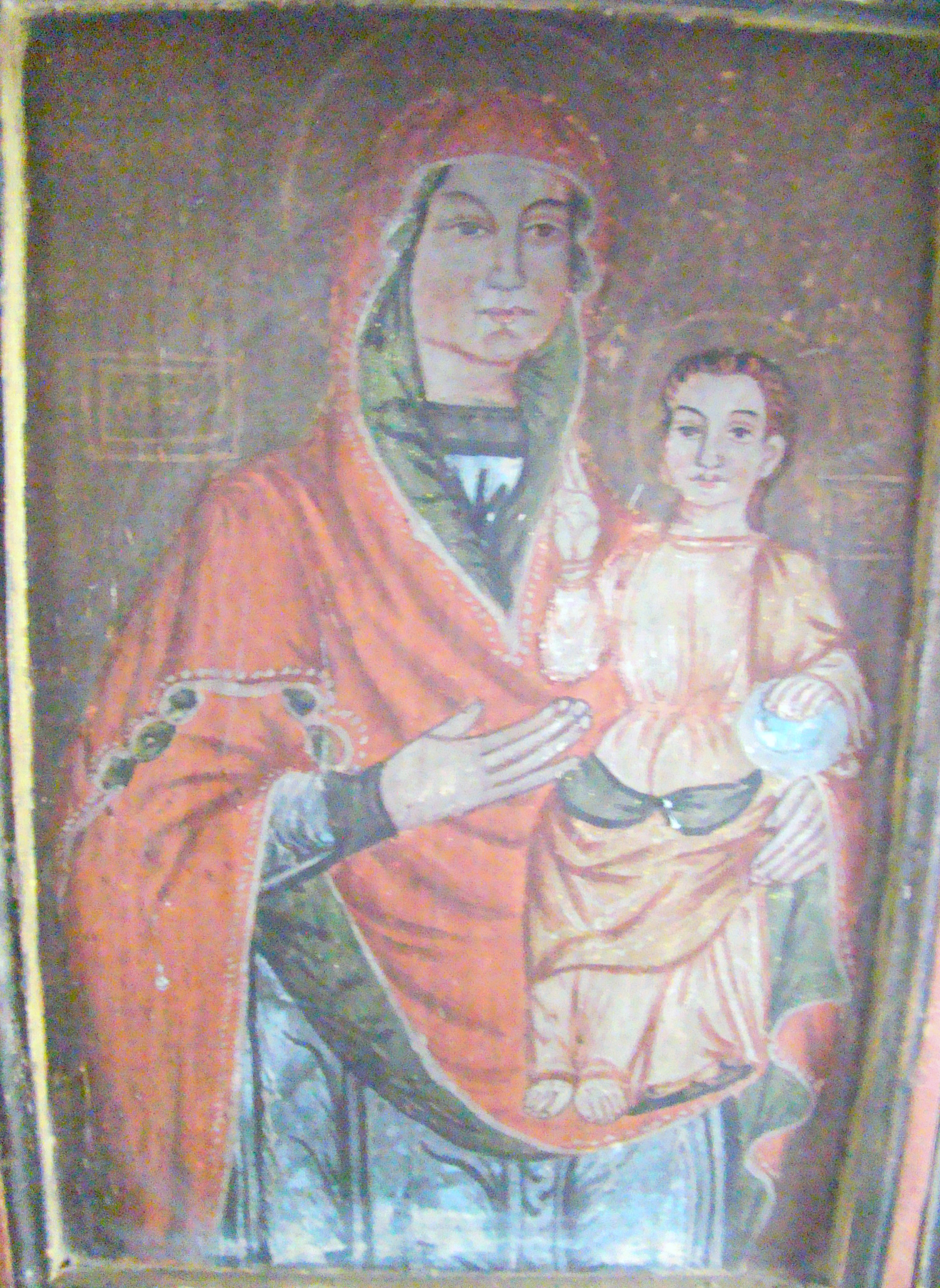 Biserica de lemn "Cuvioasa Paraschiva" , sat STEJERA; comuna MIREŞU MARE